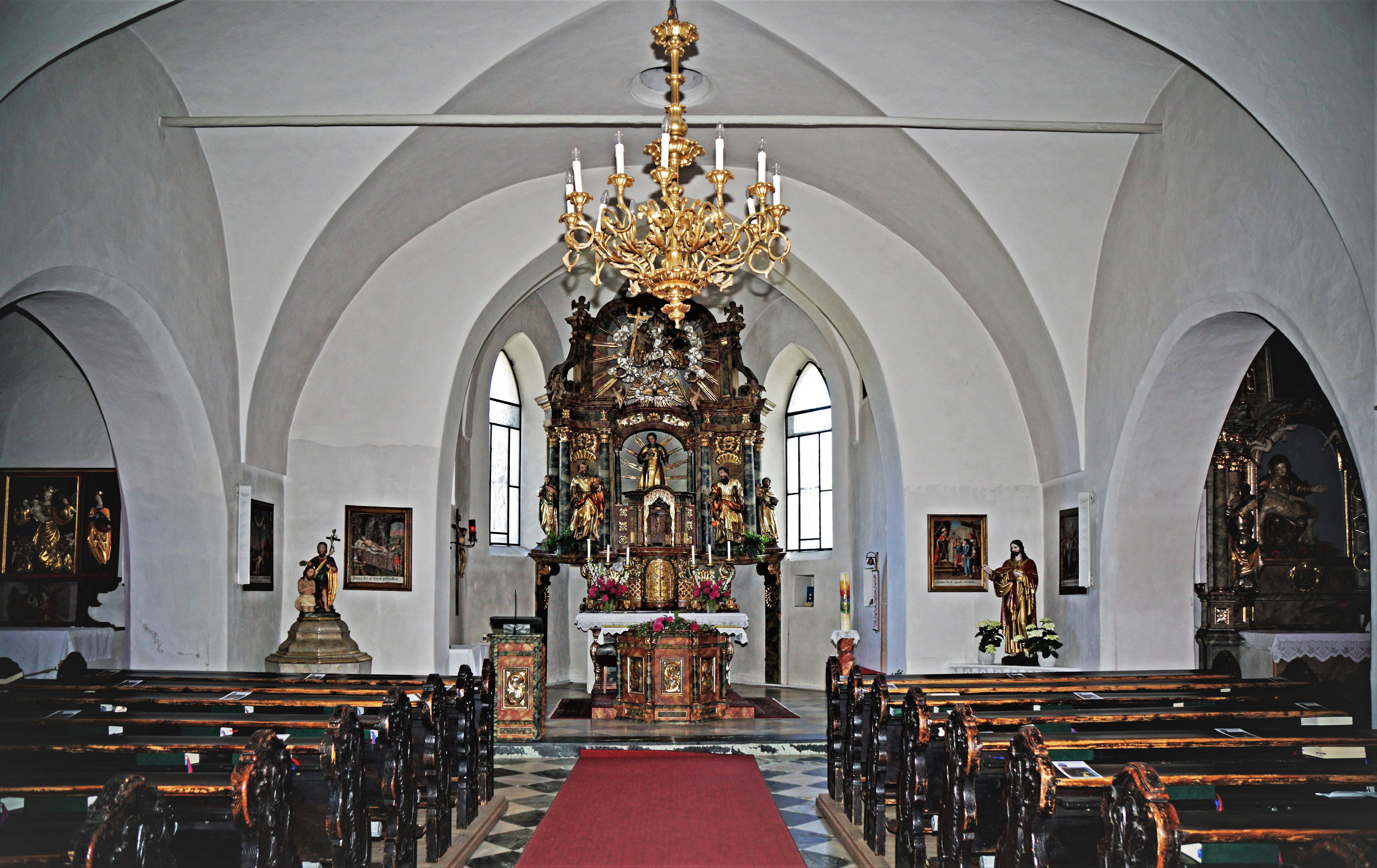 Kath. Pfarrkirche St. Stefan (Finkenstein), Innenansicht